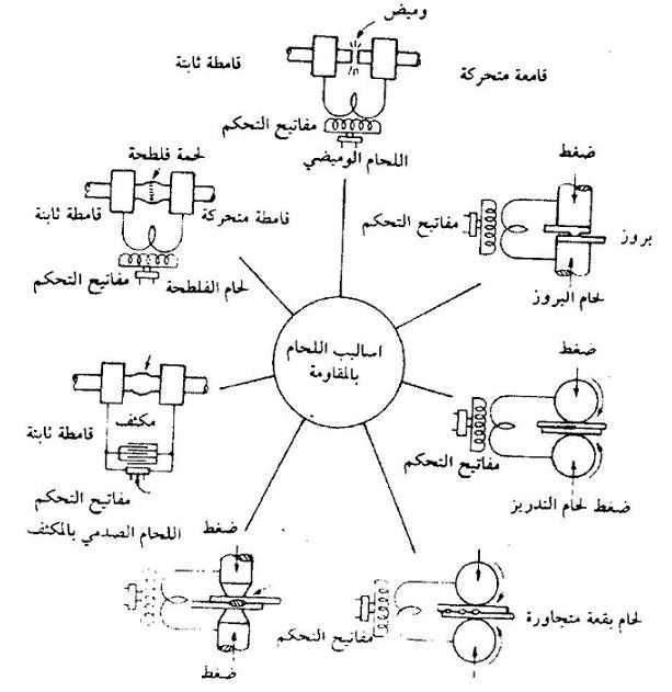 اساليب اللحام بالمقاومة الكهربية